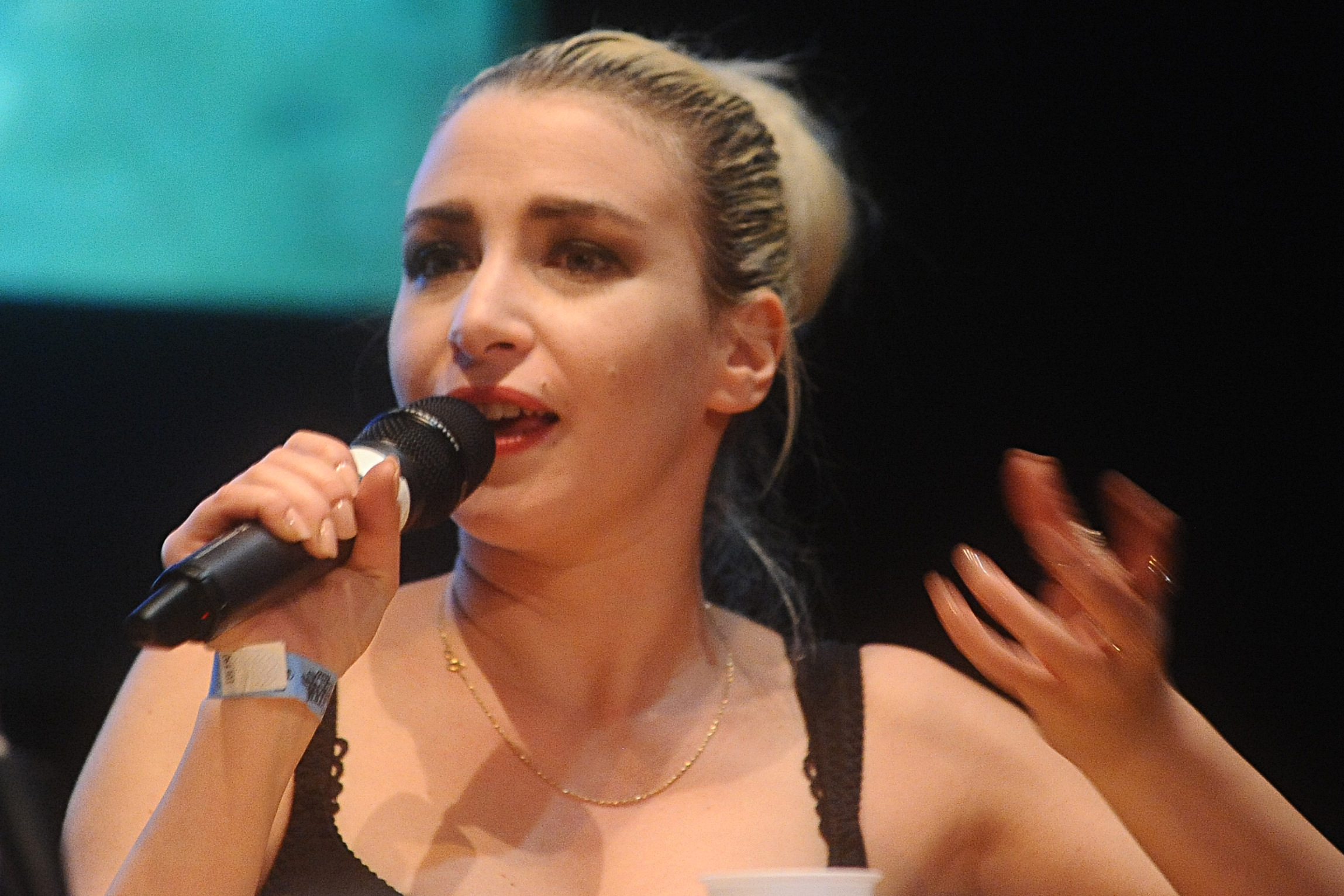 Romina Falconi. Teatro di San Girolamo.